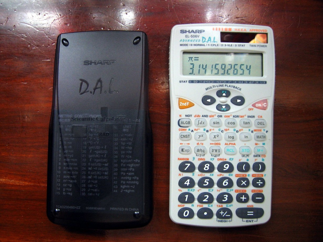 左面是Sharp EL-506V的背蓋及物理常數和公制轉換速查卡，右面是Sharp EL-506V機身